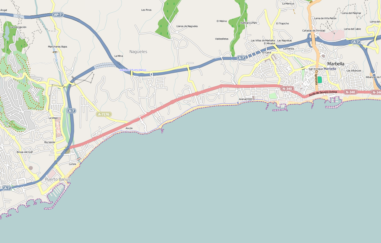 Puerto Banus